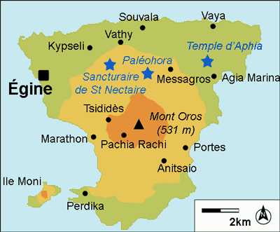 Description : Carte d'Egine Place : Egine, Greece Date : Août 2006 Author : Réalisation Pline